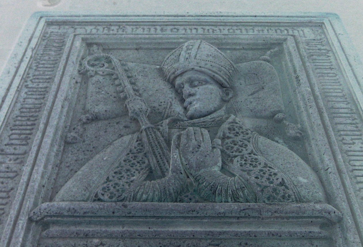 tomb of antipope Clemens VIII, La Seu, Palma de Mallorca